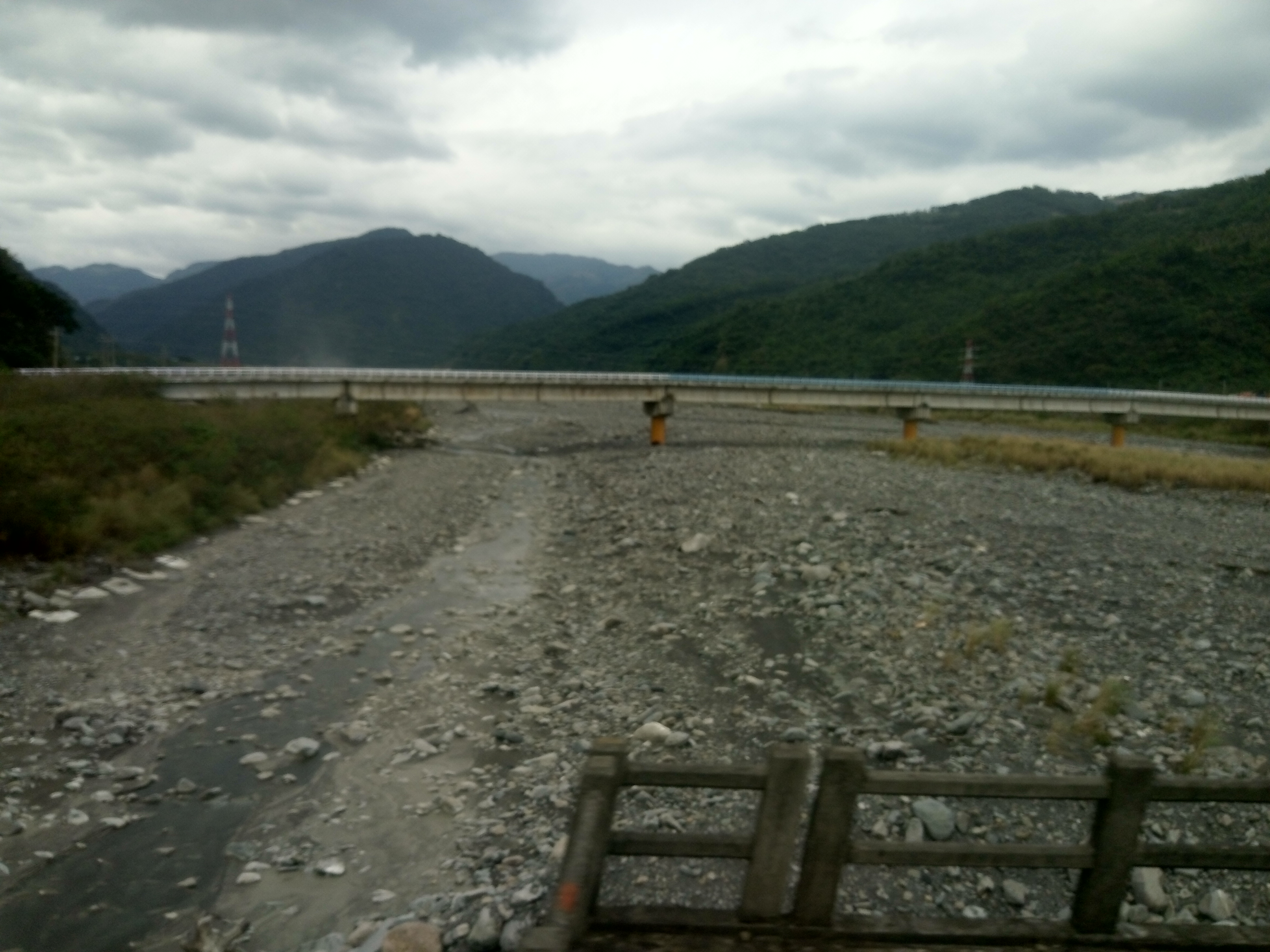 臺灣臺東縣大竹溪